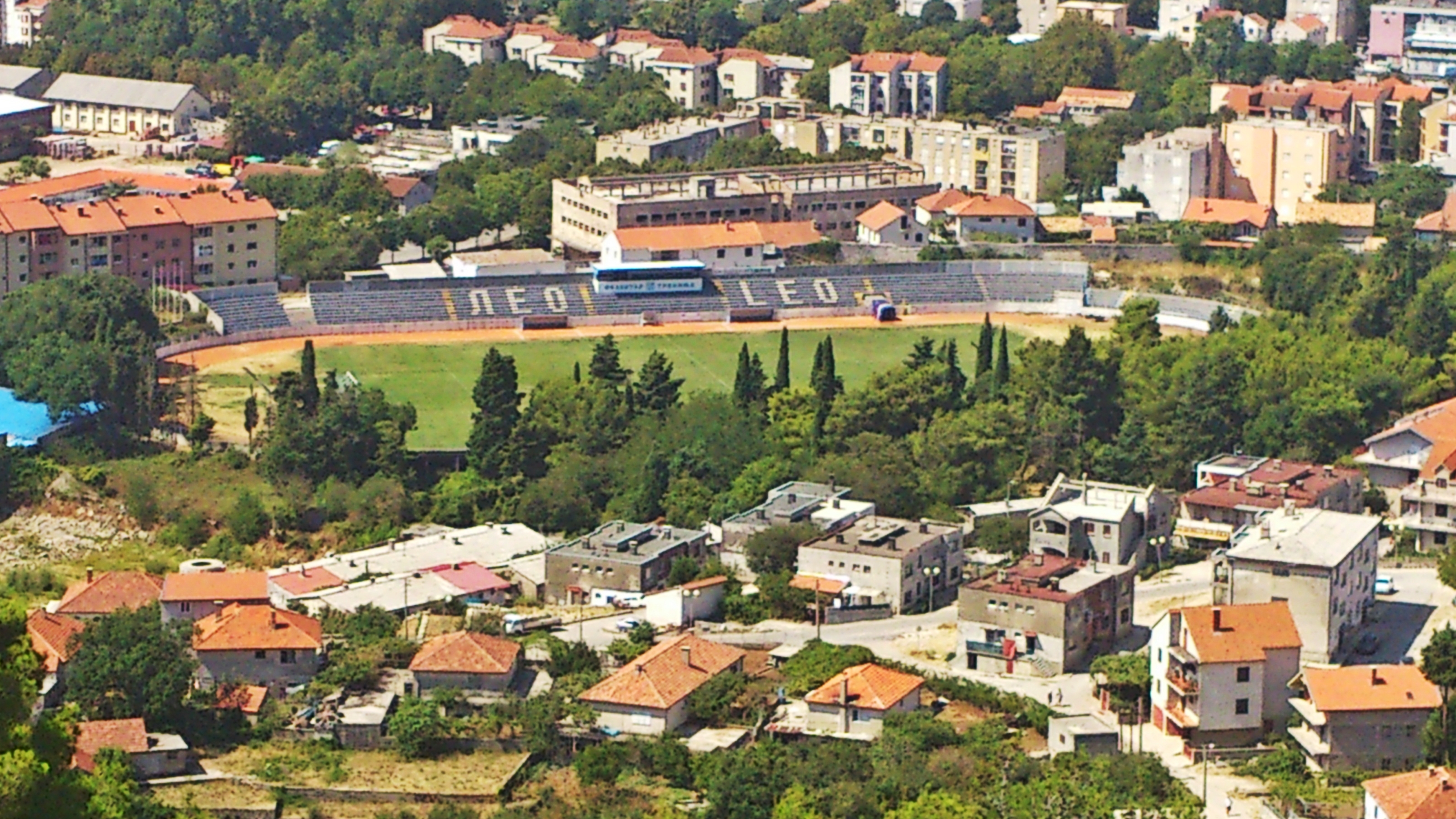 Стадион в Требинье